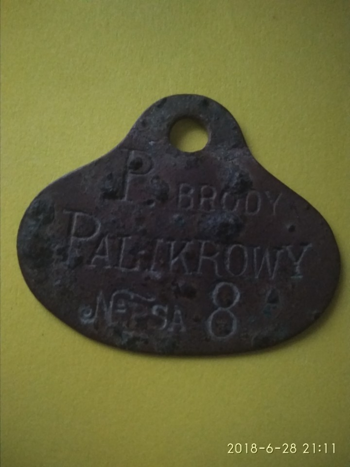 с Паликорови. За Польщі такі медальйони носили місцеві собаки